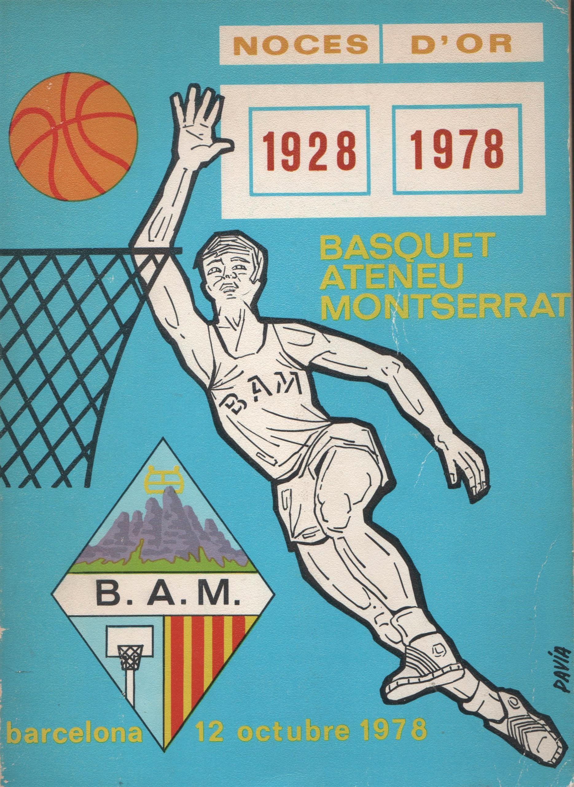 Cartell de celebració dels 50 anys